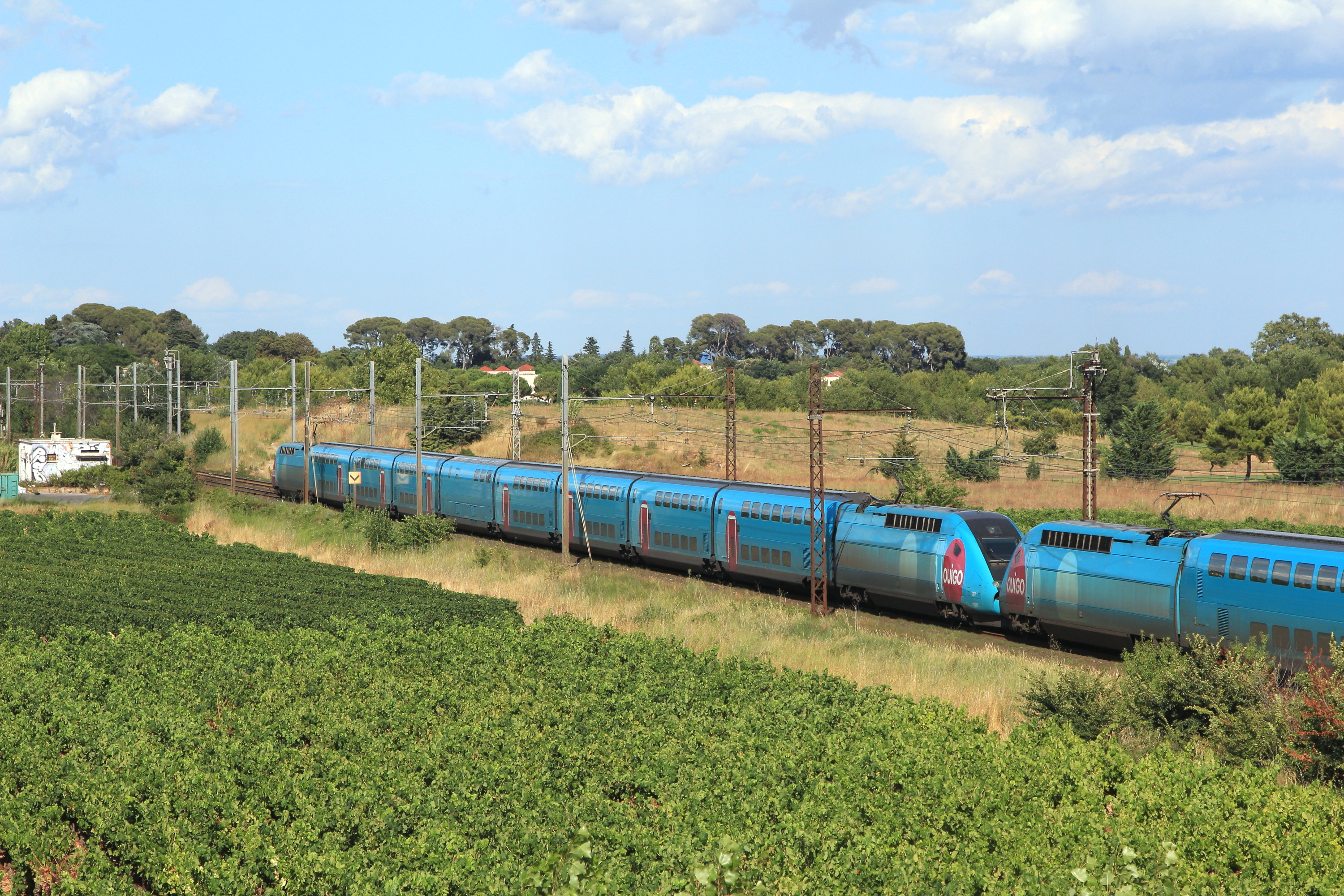 Deux rames TGV Ouigo entre Montpellier et Baillargues à Saint-Aunès